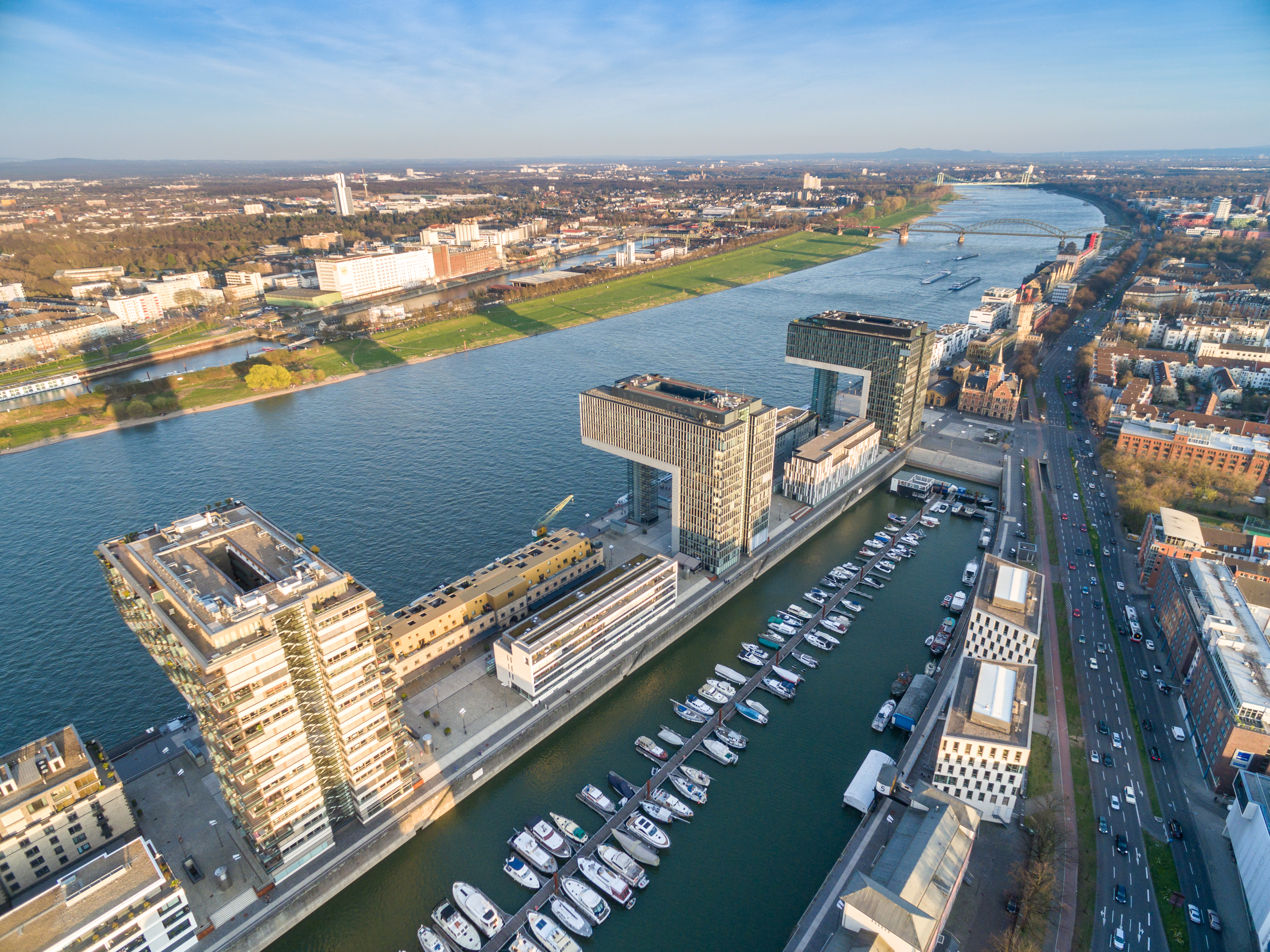 Cologne